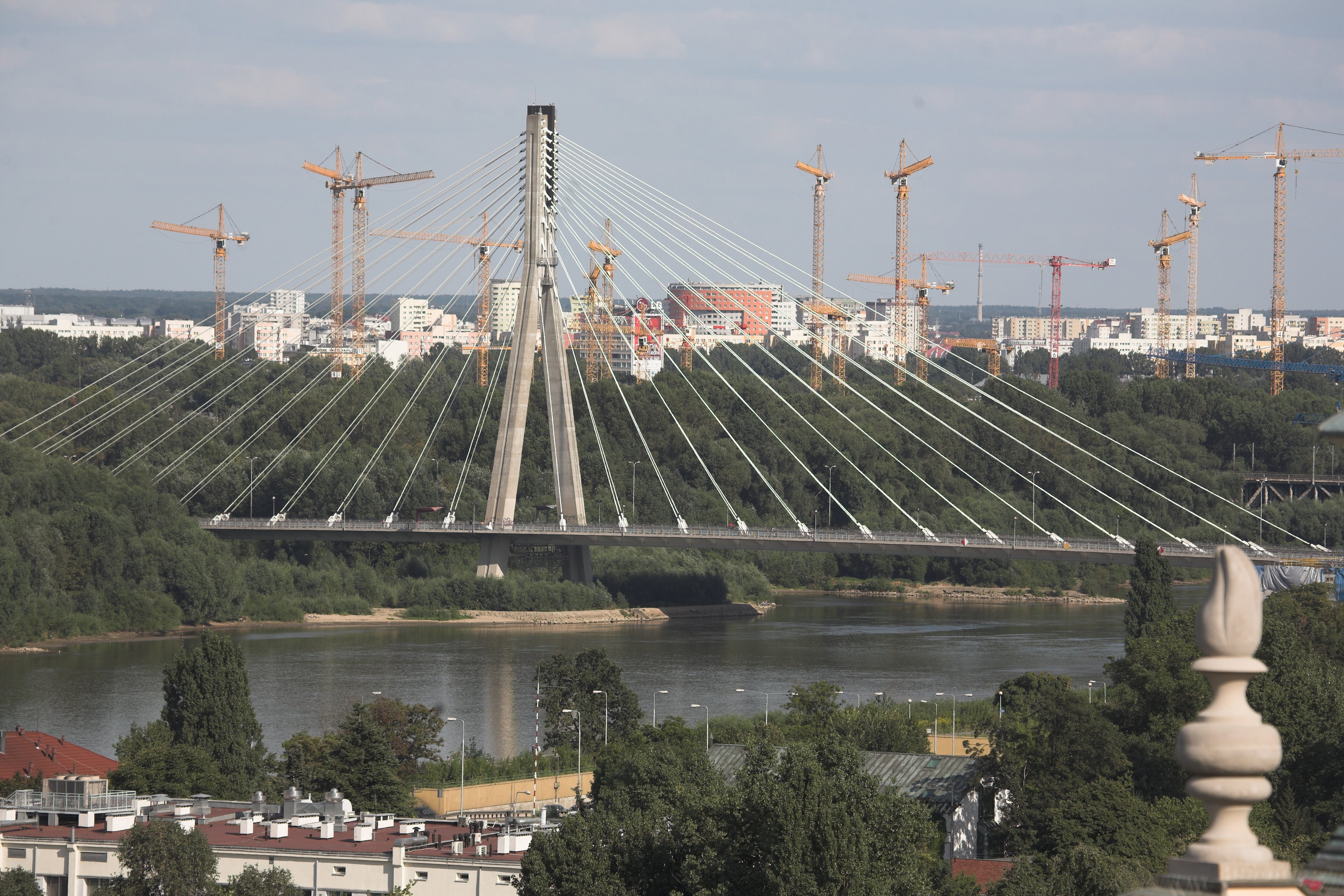 Most Świętokrzyski w Warszawie